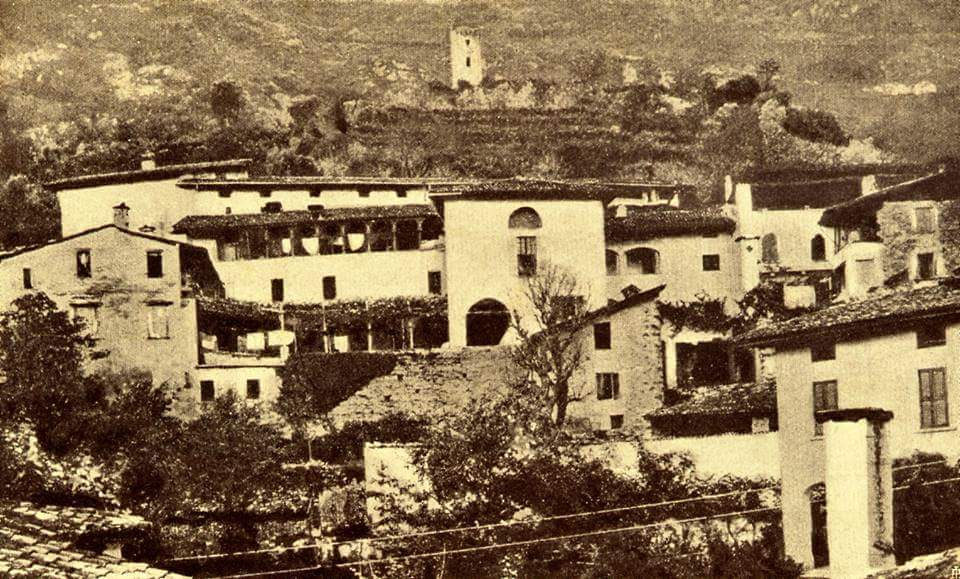 Ospedale infermi cronici e miserabili primi del 900